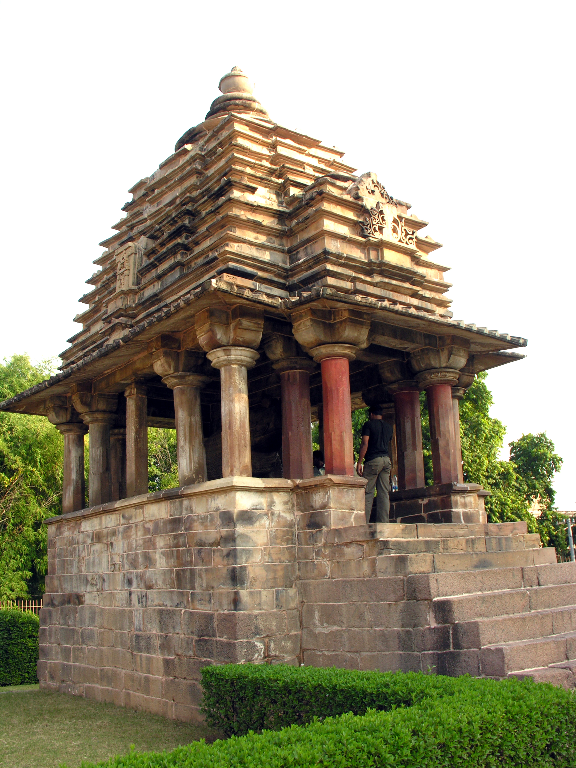 India-5595